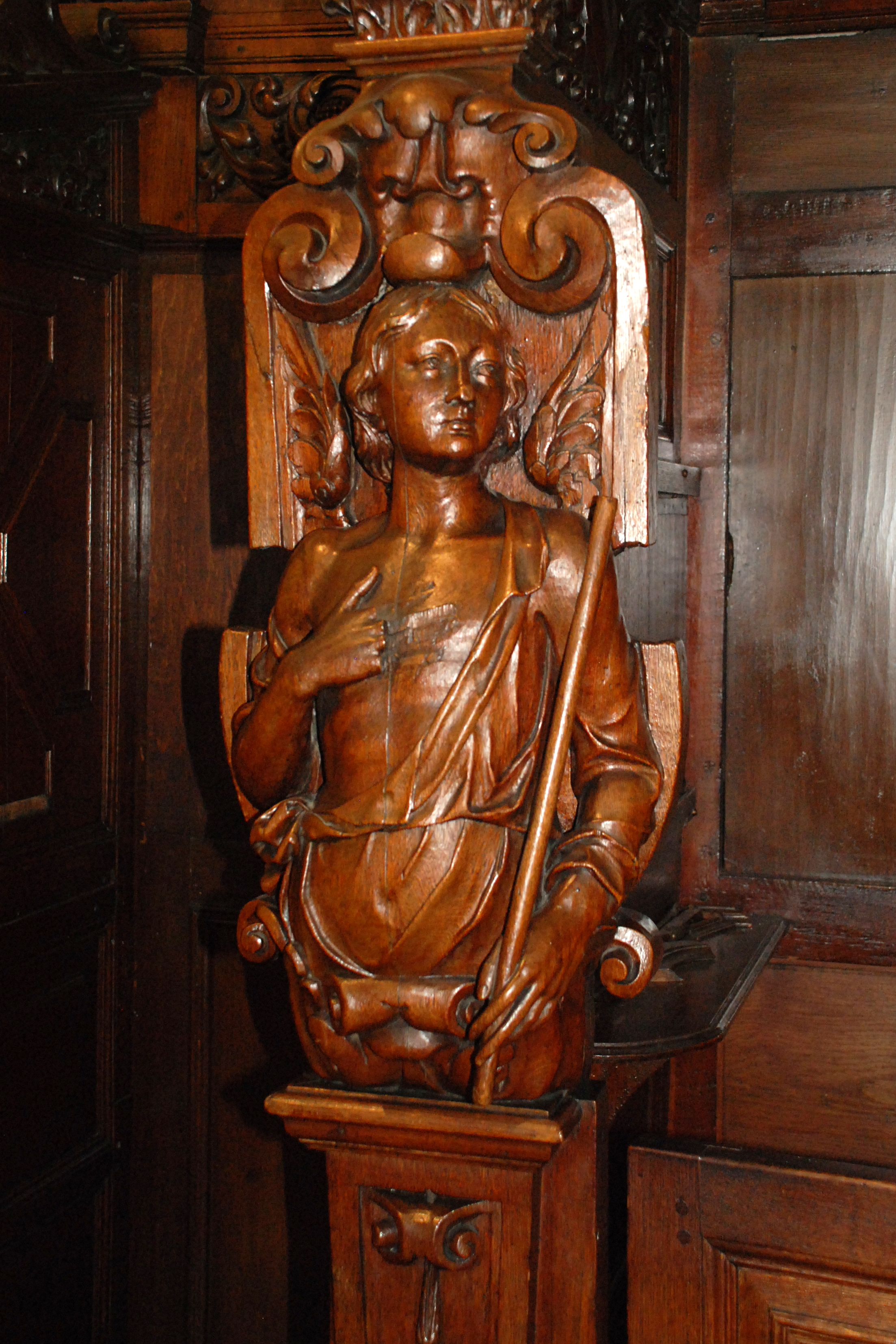 Belgique - Brabant wallon - Mont-Saint-Guibert - Église Saint-Guibert - Confessionnaux